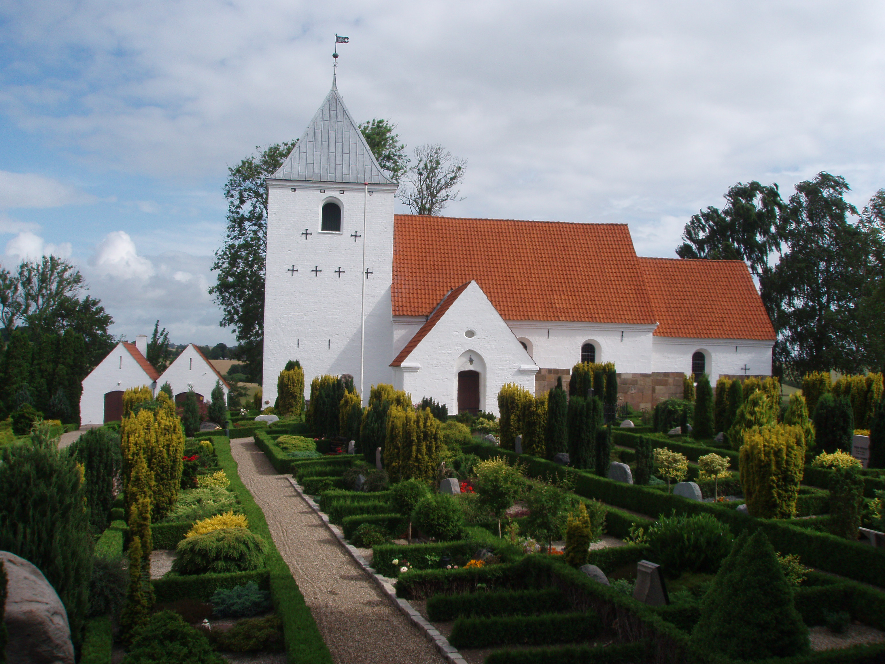 Tolstrup Kirke